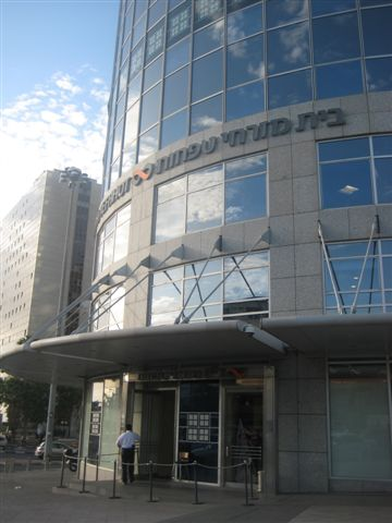 בית מזרחי טפחות